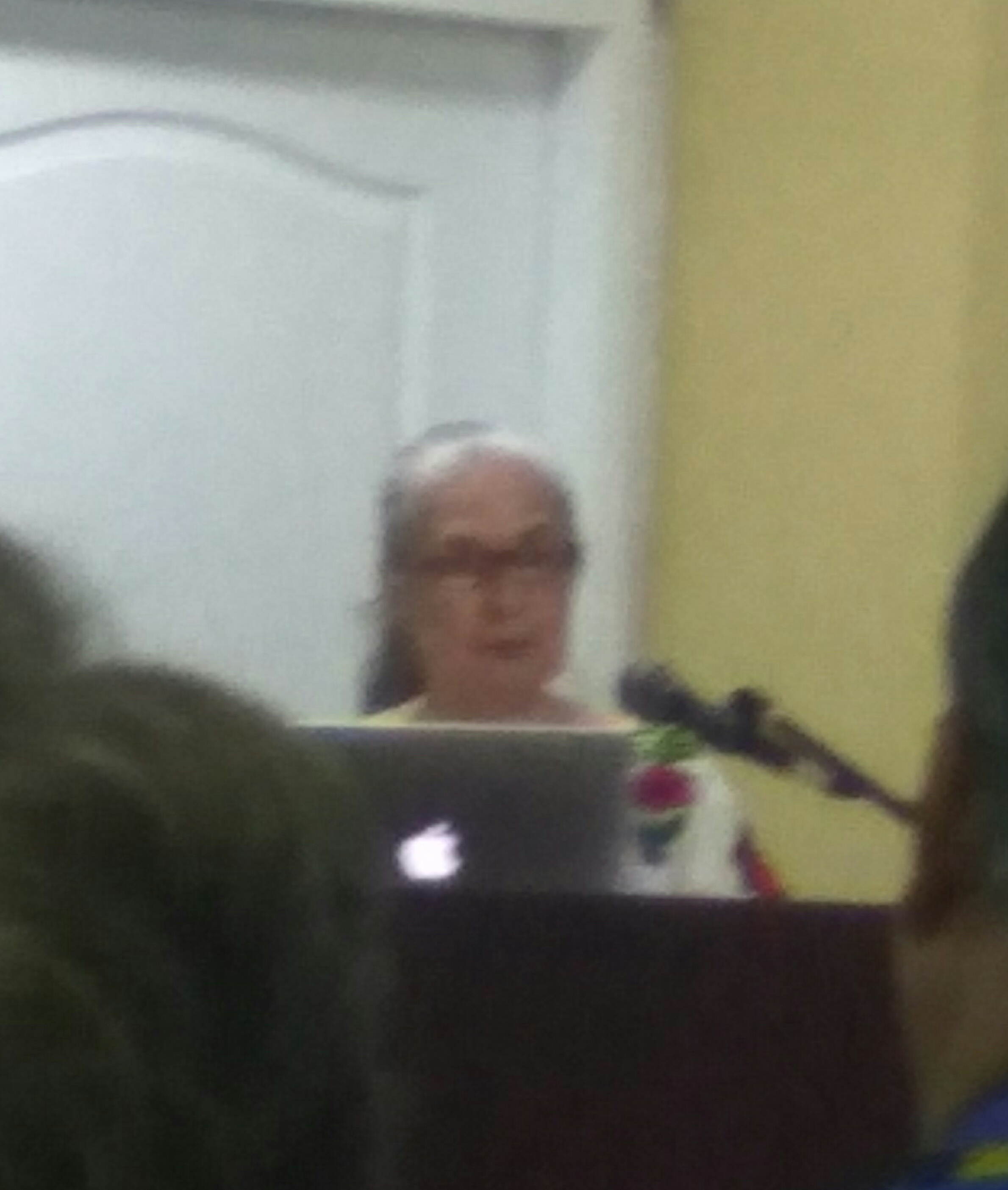 Escritora hondureña, Helen Umaña.